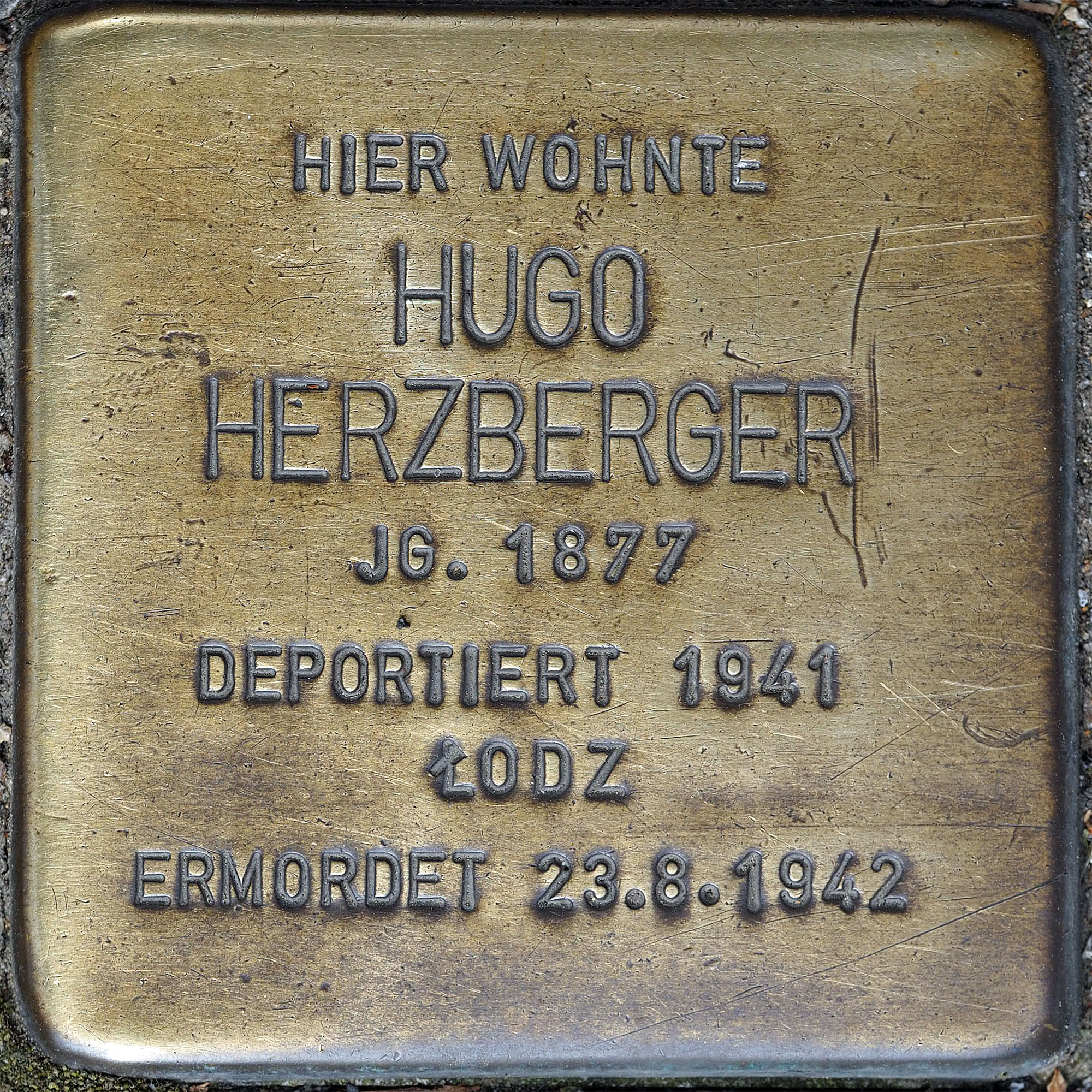 Stolpersteine MG: Herzberger, Hugo